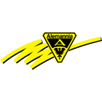 Früheres Wappen von Alemannia Aachen